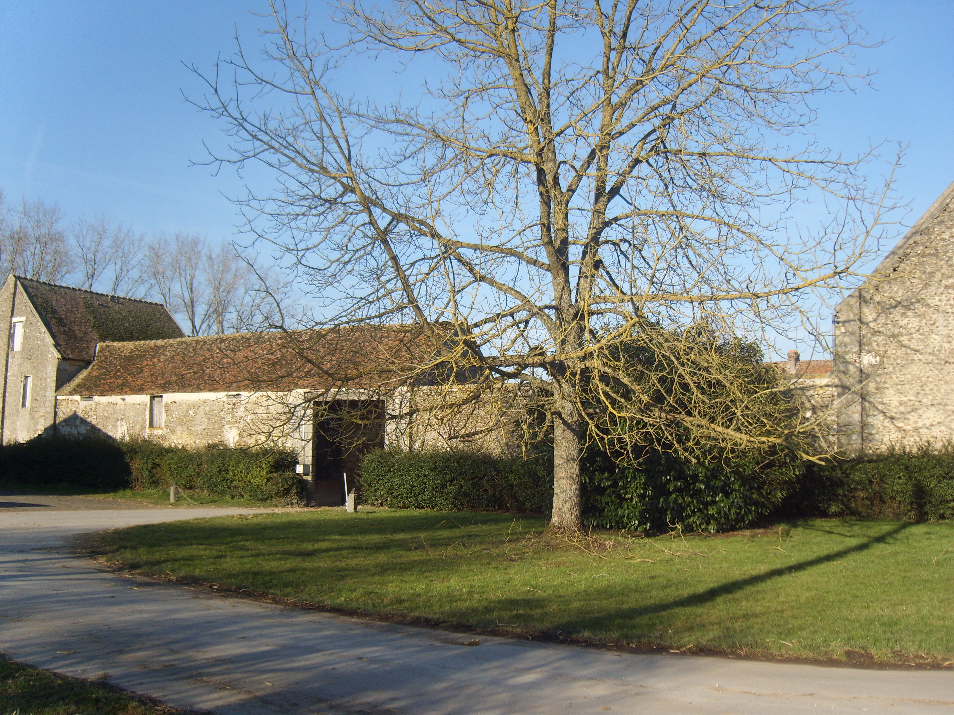 La ferme de Jean Grogne à Fontenay-Trésigny